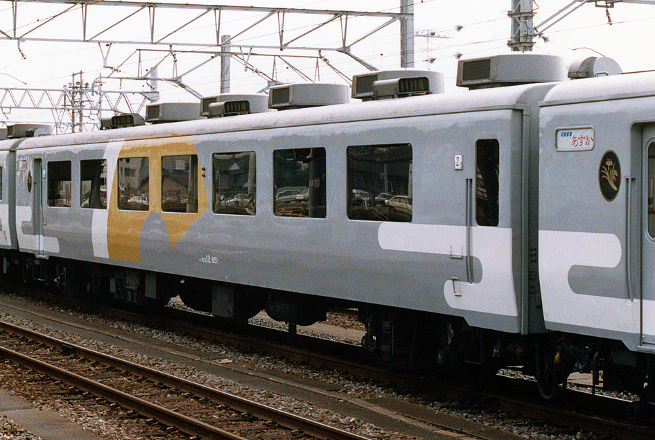 JR西日本 12系・14系和風客車「あすか」 2号車 オロ12 851